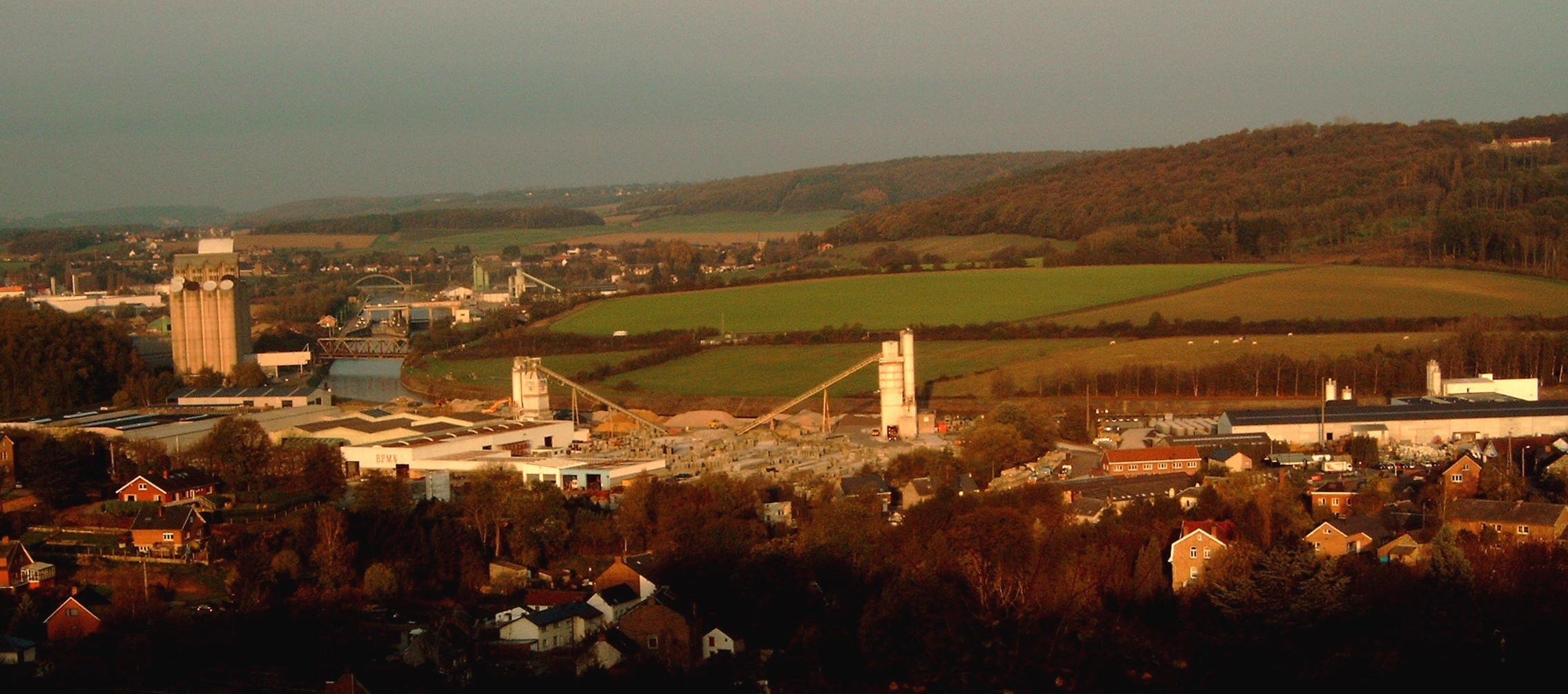 Opname van de betonfabriek BPMN in Malonne, Belgie. Eigen foto, beschikbaar gesteld voor publiek domein.